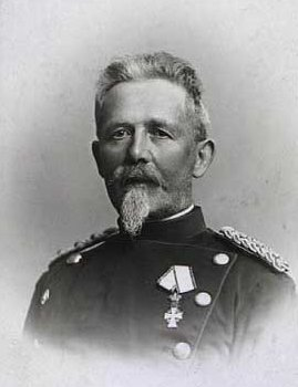 Johannes Christian Madsen (28.5.1849-2.5.1914), officer, husflids- og sløjdmand